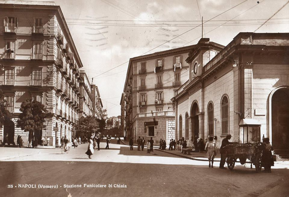 Napoli, Vomero. Stazione della Funicolare di Chiaia. Cartolina. Autore sconosciuto.